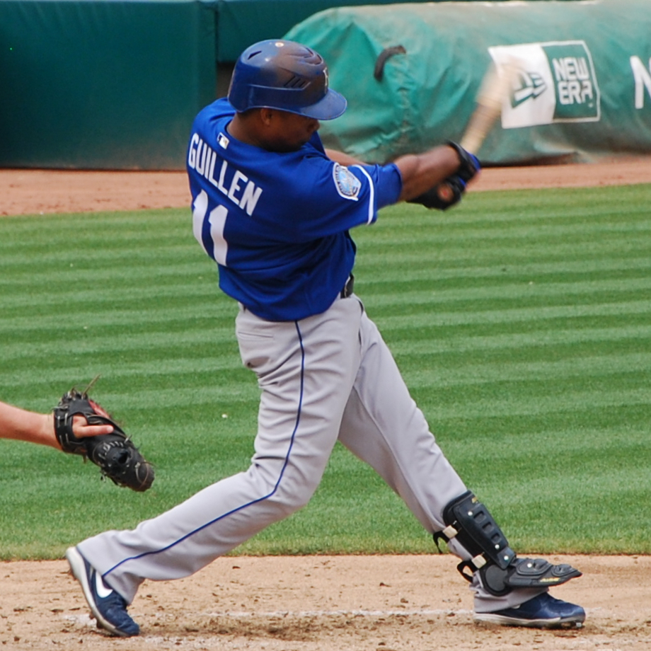 José Guillén